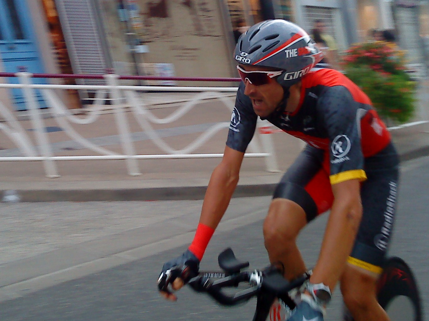 Haimar Zubeldia à l'arrivée du prologue du Tour de l'Ain 2010